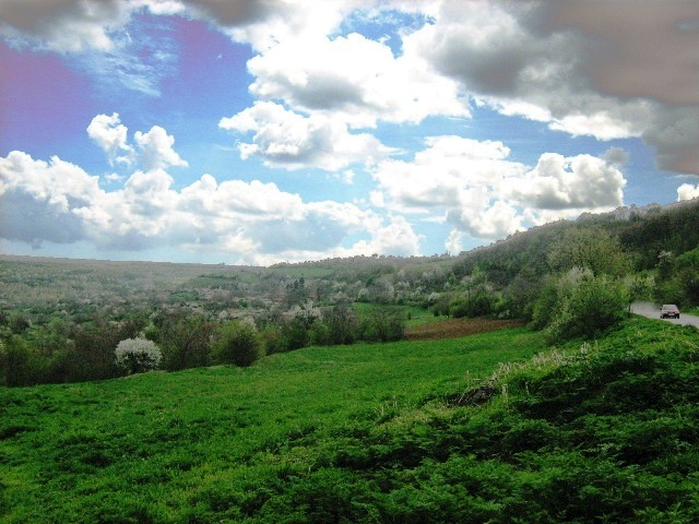 Поглед към село Долна Кабда от пътя за град Попово. Вляво на пътя се вижда Долната махала. Фото: Вл. Стойков - април 2008 год.